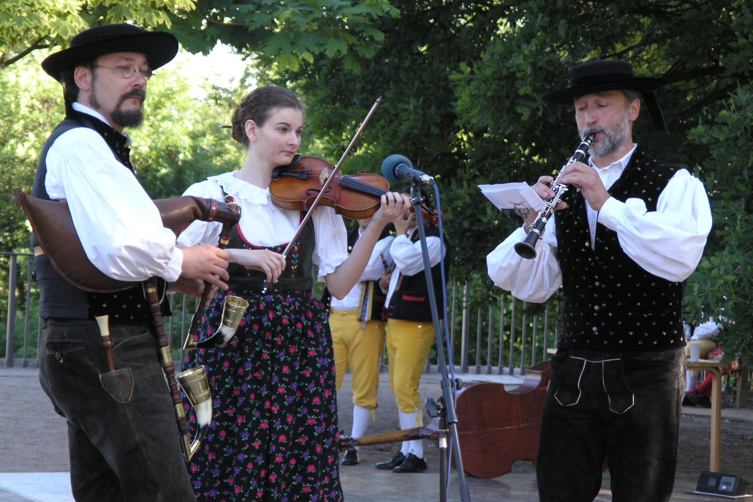 X. Národopisná slavnost v Kinského zahradě - Pošumavská dudácká muzika (vlevo kapelník Tomáš Spurný)